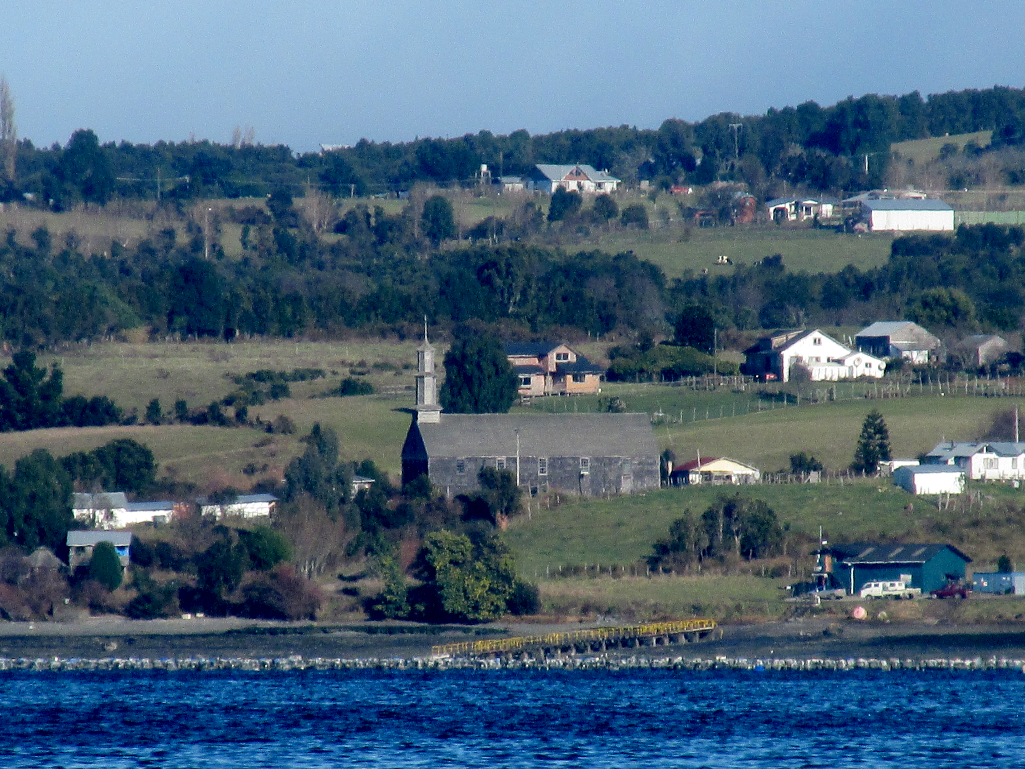 Iglesia de Vilupulli desde el mar, Chonchi, región de Los Lagos, Chile.